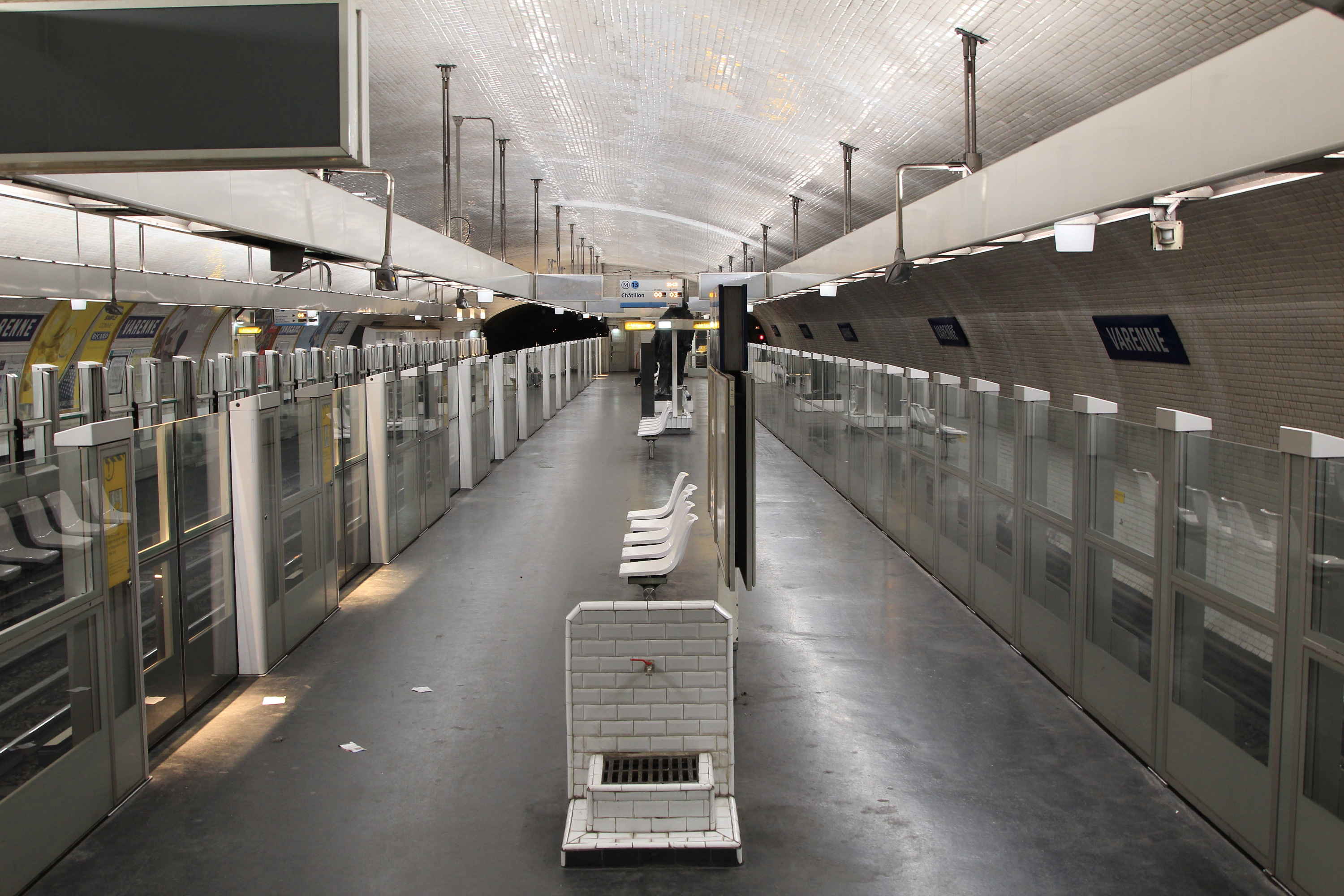 Quai direction Châtillon-Montrouge de la station Varenne.